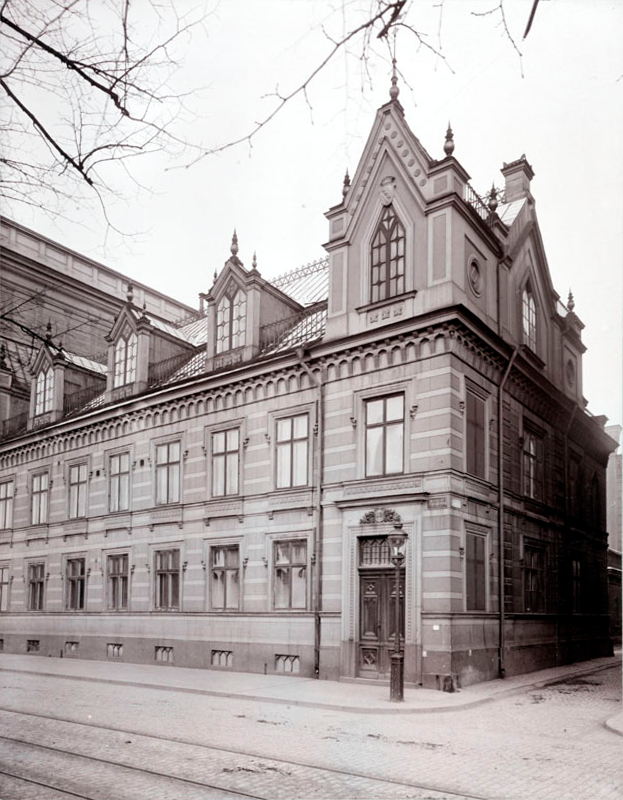 Hörnet av Kungsträdgårdsgatan och Wahrendorffsgatan Plats: Kvarteret NÄCKSTRÖM. Kungsträdgårdsgatan 10. Wahrendorffsgatan. Norrmalm.